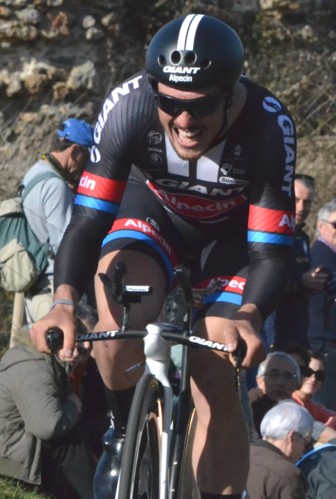 Paris-Nice 2015